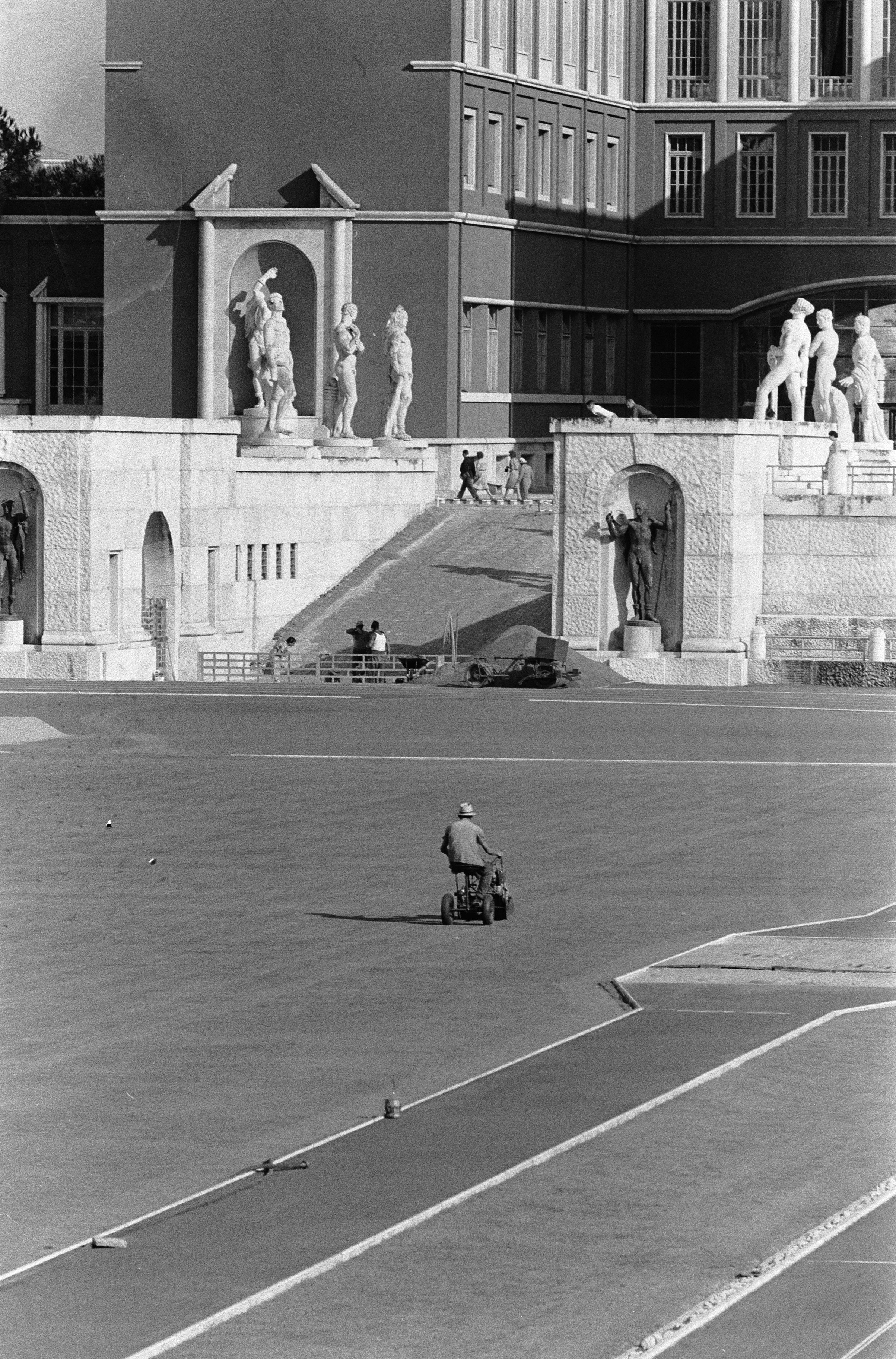 Collectie / Archief : Fotocollectie Anefo Reportage / Serie : [ onbekend ] Beschrijving : Olympische Spelen te Rome, werkzaamheden in het Stadio dei Marmi Annotatie : Dit stadion, gebouwd tussen 1928 en 1932, werd alleen gebruikt voor enkele hockeywedstrijden en een aantal ceremoniën Datum : 23 augustus 1960 Locatie : Rome Trefwoorden : stadions Fotograaf : Pot, Harry / Anefo Auteursrechthebbende : Nationaal Archief Materiaalsoort : Negatief (zwart/wit) Nummer archiefinventaris : bekijk toegang 2.24.01.05 Bestanddeelnummer : 911-5252